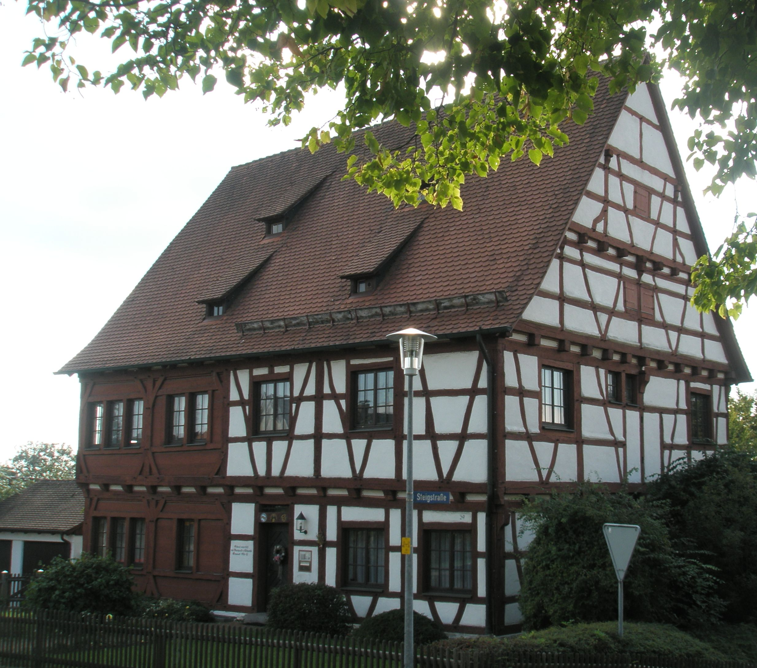 Das Schwendier Pfarrhaus wurde im Jahr 1551 vom damaligen Ortsherren Marquard von Schwendi als sein Wohnhaus erbaut.